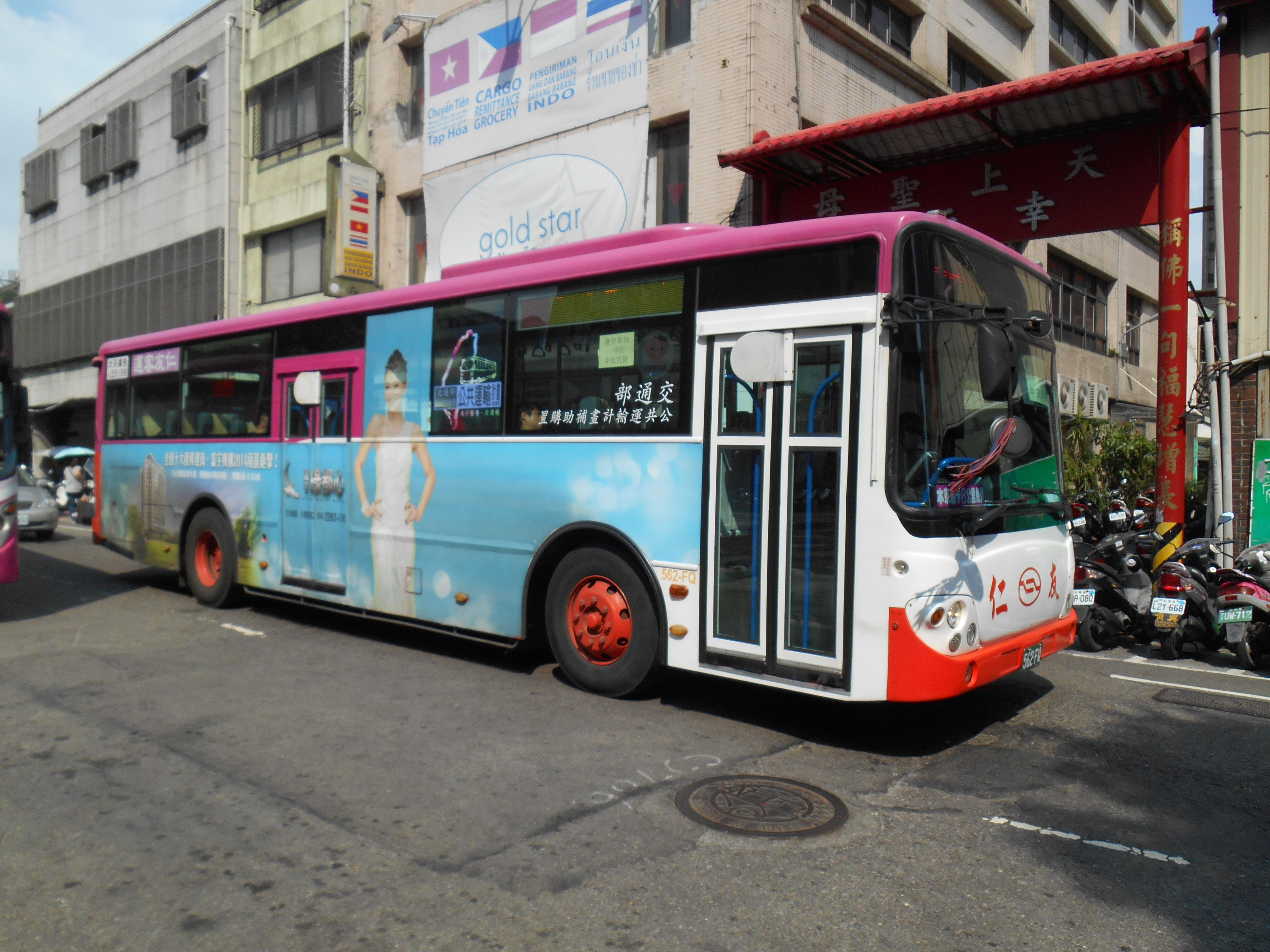 中文（台灣）: 仁友客運2010(2010)DAEWOO BC211ML大客車562-FQ